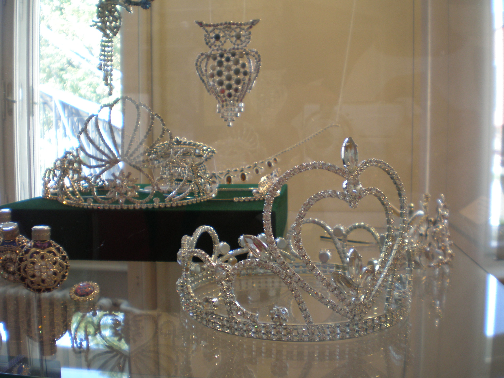 Jablonec nad Nysą